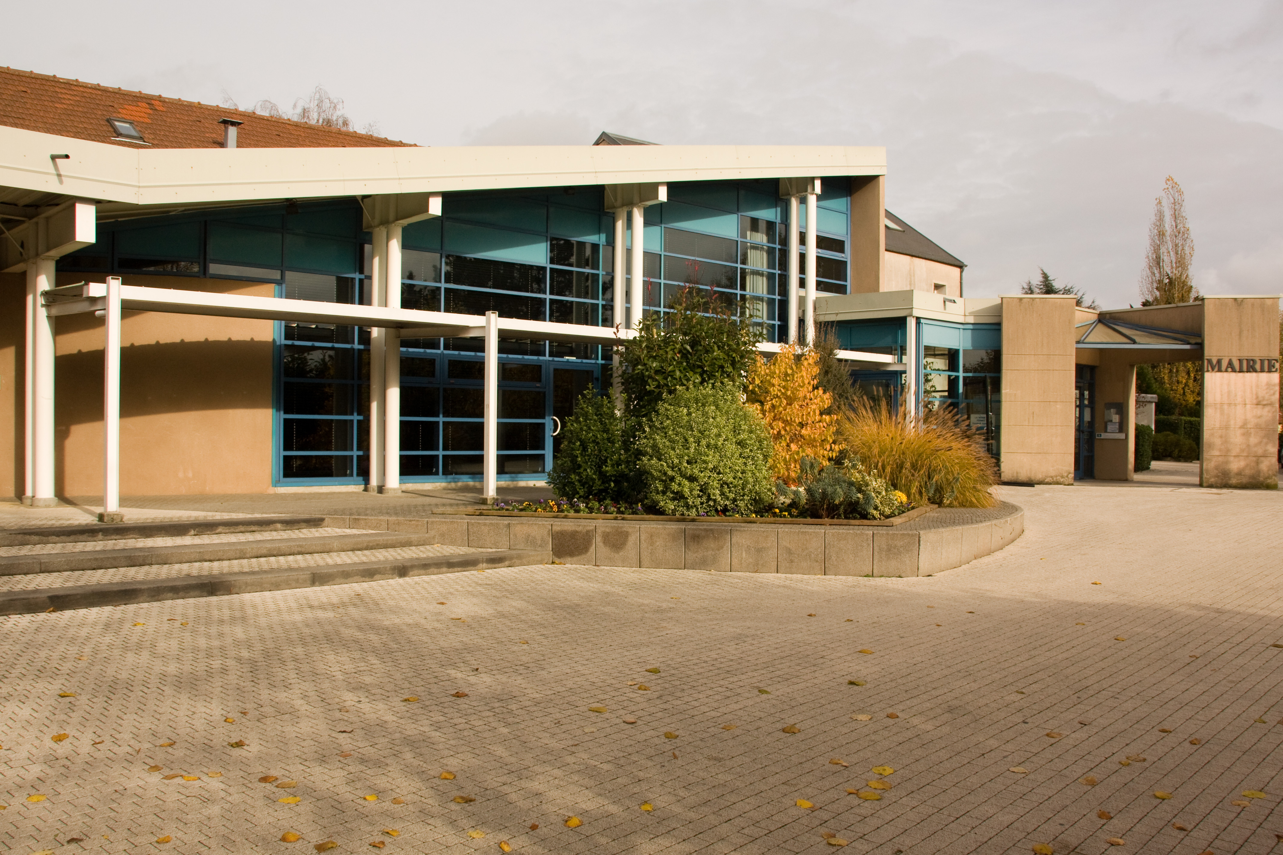 Mairie de Courcouronnes, Courcouronnes, Essonne, France